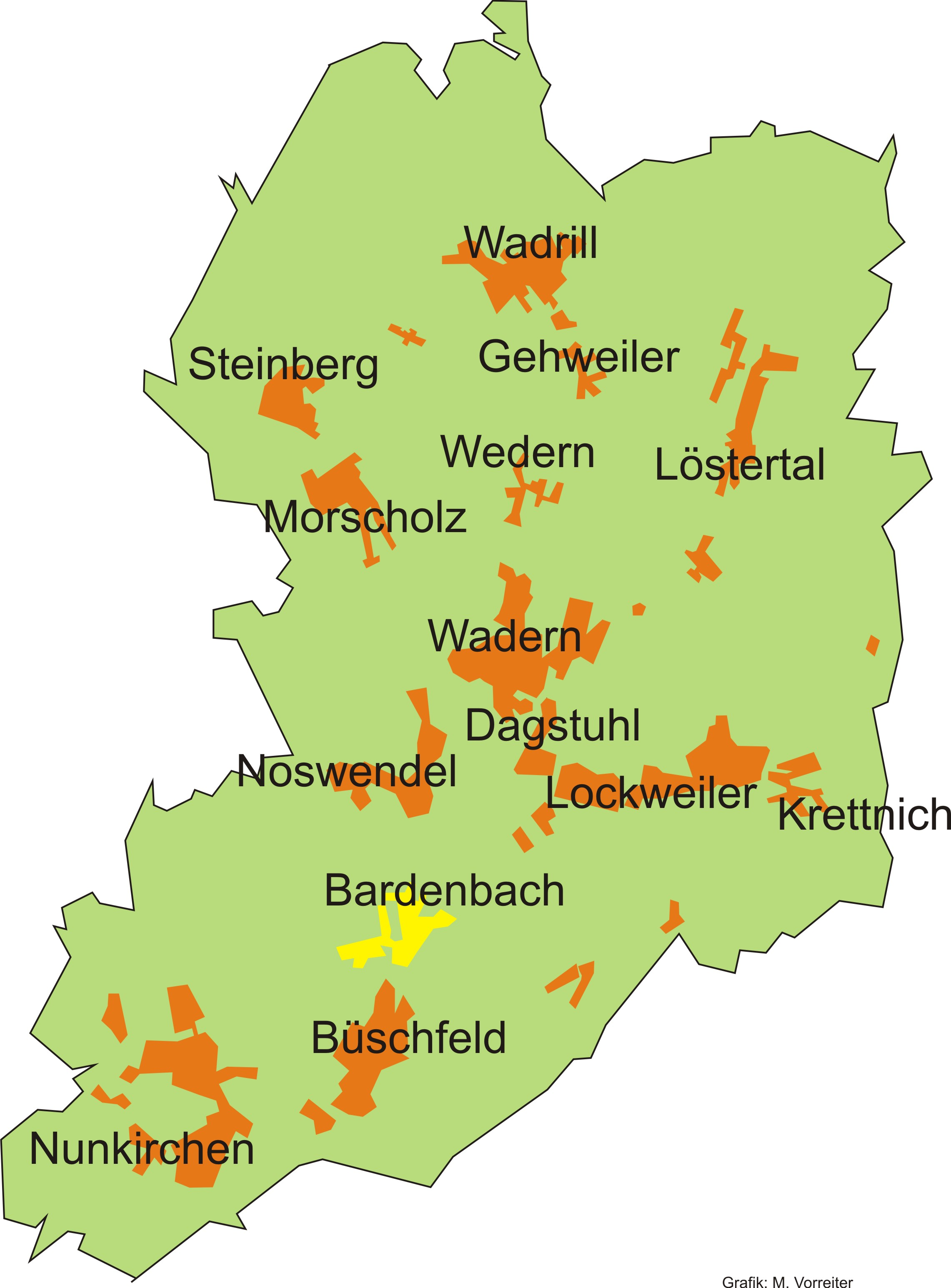 Lage des Stadtteils Bardenbach im Stadtgebiet